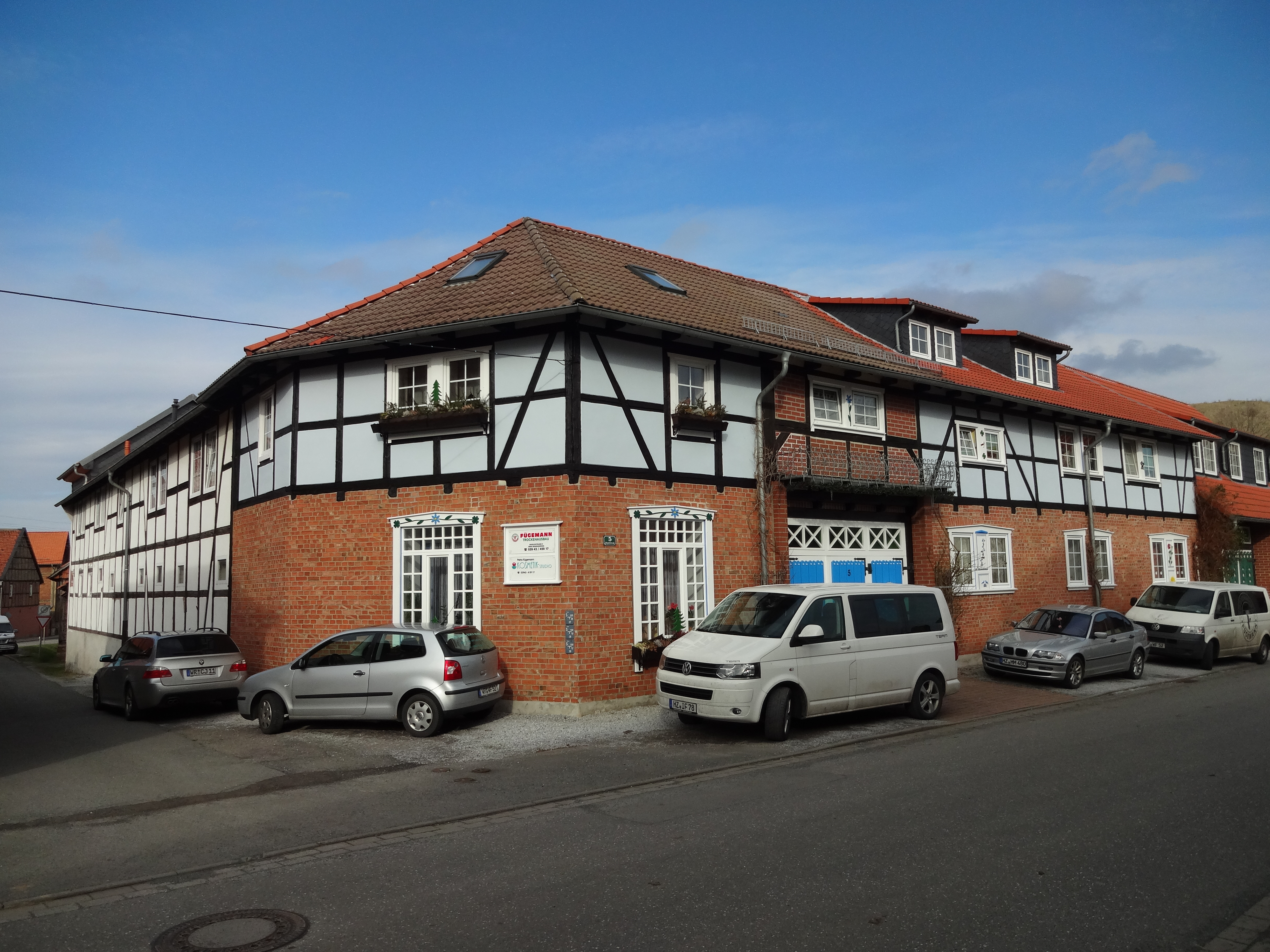 ehemaliges Kulturdenkmal Bauernhof in der Ziegeleistraße 5 in Benzingerode, Ortsteil von Wernigerode